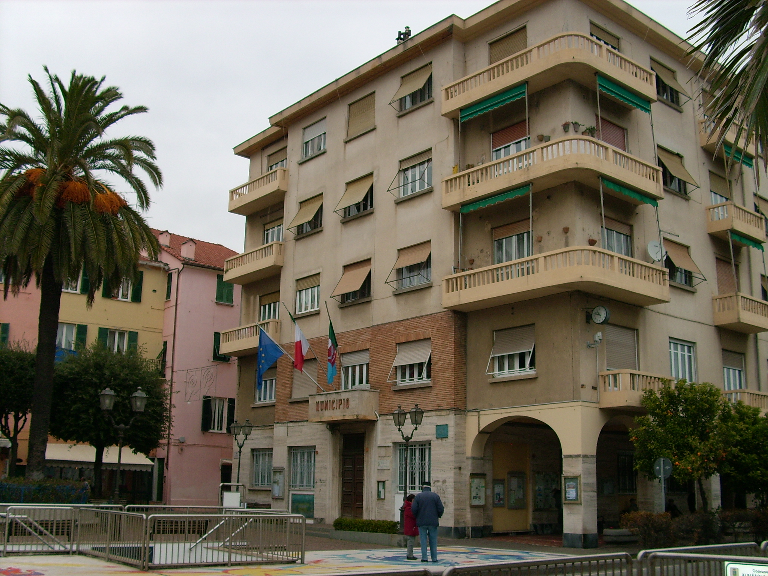 Municipio di Albissola Marina, Liguria, Italy